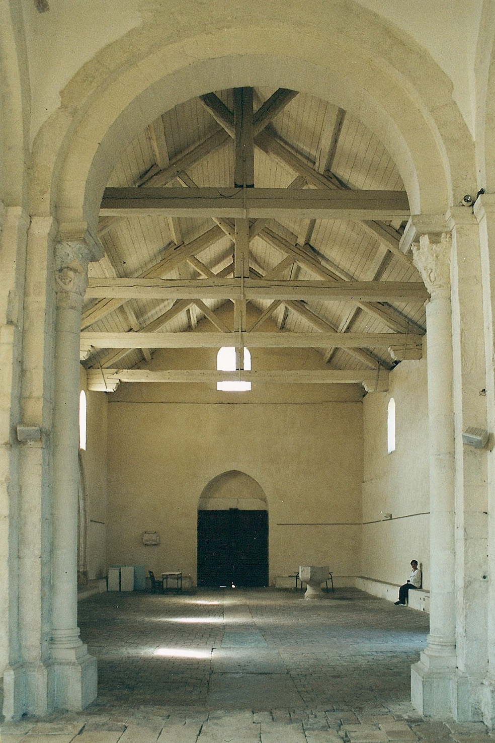 St.-André-de-Bâgé, Schiff aus dem Chor